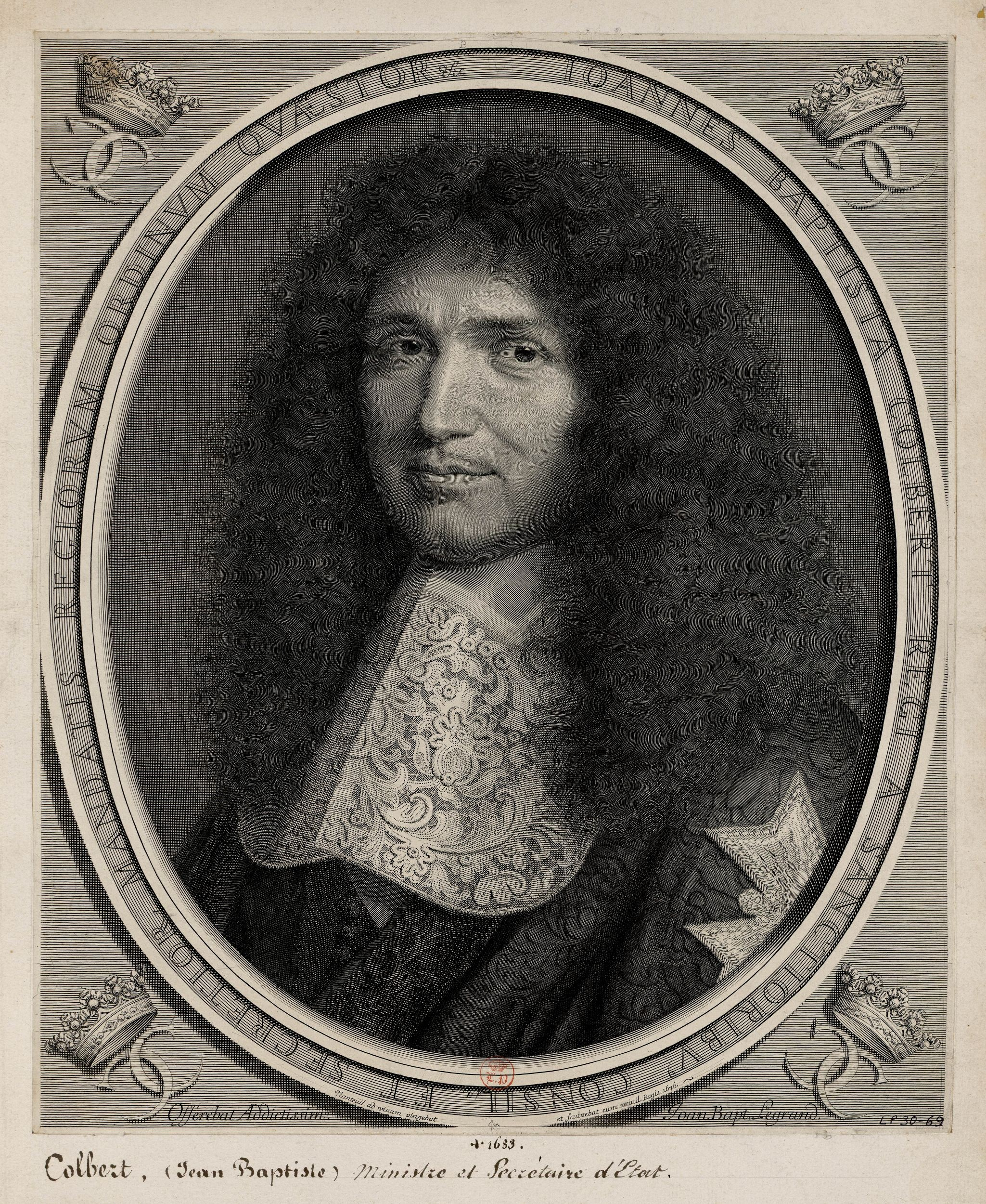 Portrait de Jean-Baptiste Colbert par Robert Nanteuil.